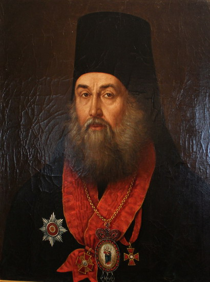 Ириней (Несторович Иван Гаврилович), епископ русской православной церкви